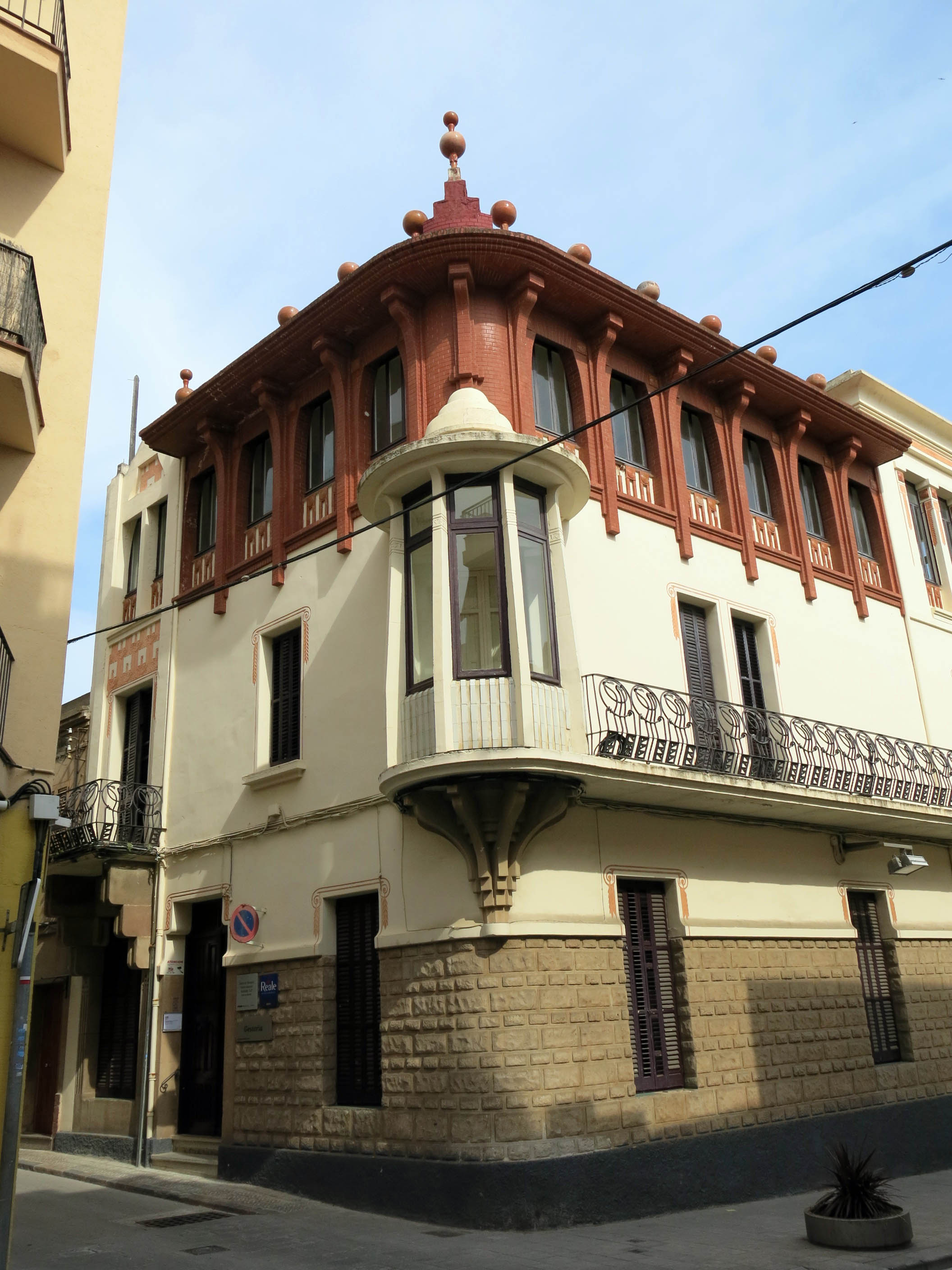 Can Roig (Canet de Mar)